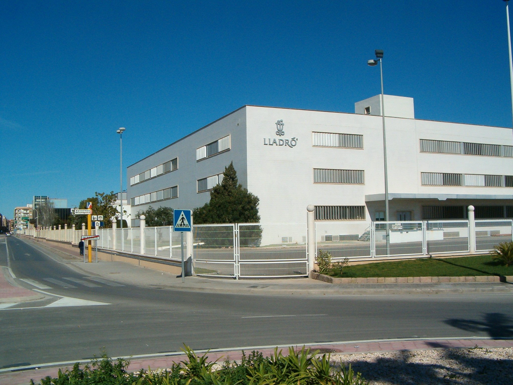 Vista de la Ciudad de la Porcelana en Tavernes Blanques (Valencia, España) el principal centro de producción de la industria Lladró, construida entre 1967 y 1969 con posteriores ampliaciones